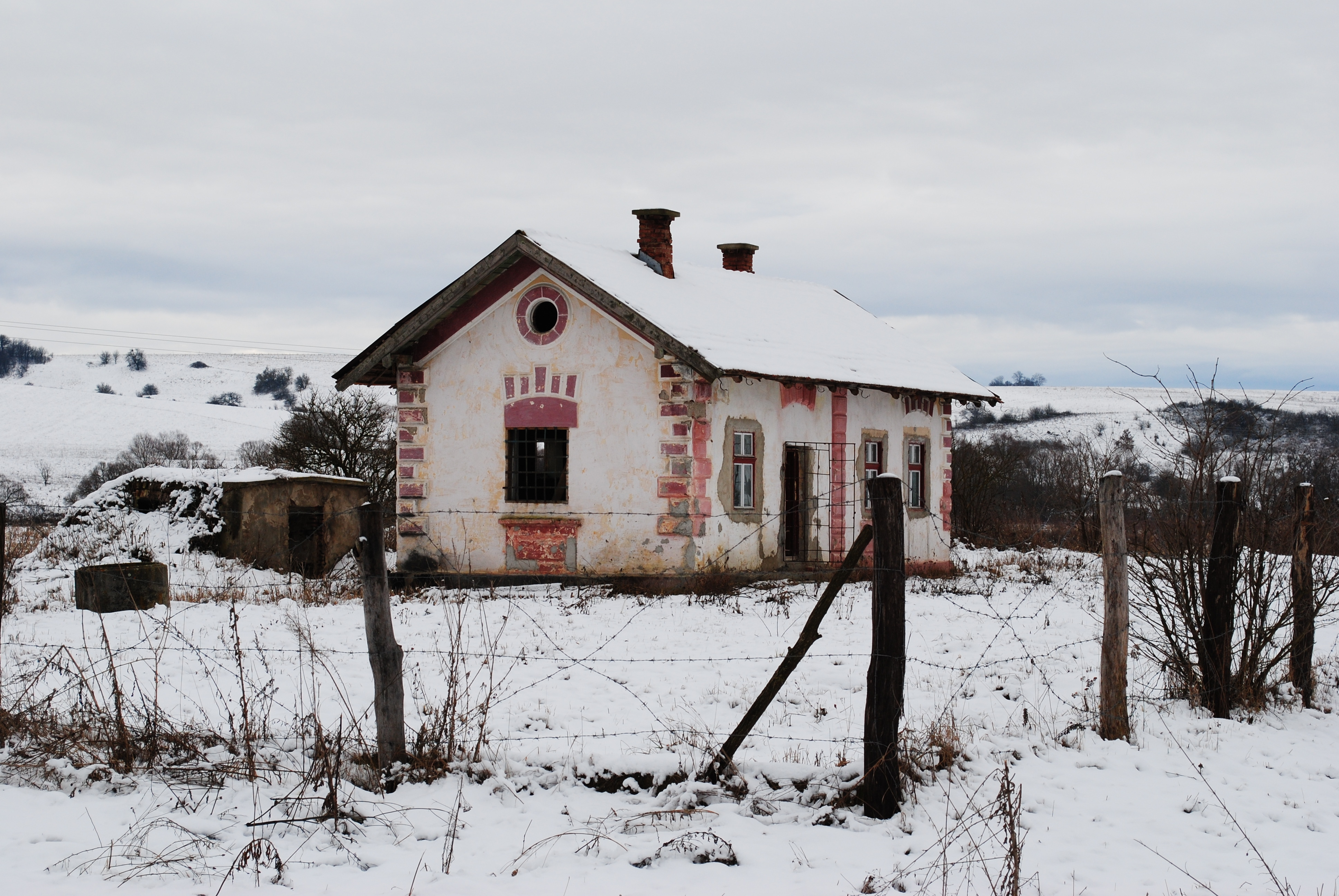 Halta Proștea (veche denumire a satului Stejărișu), 1898 - 1910 05